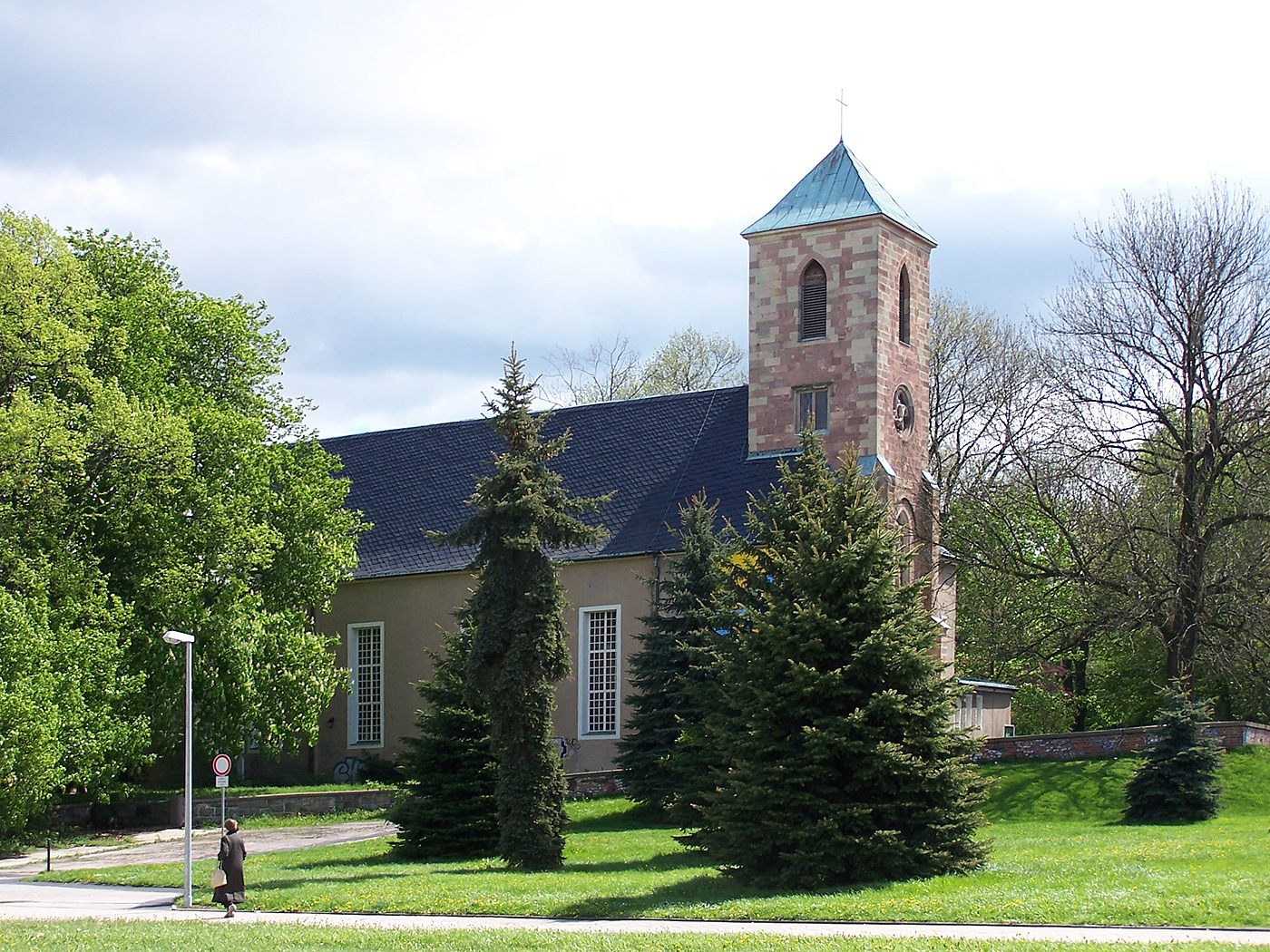 Die Johanniskirche in Chemnitz :Kategorie:Chemnitz